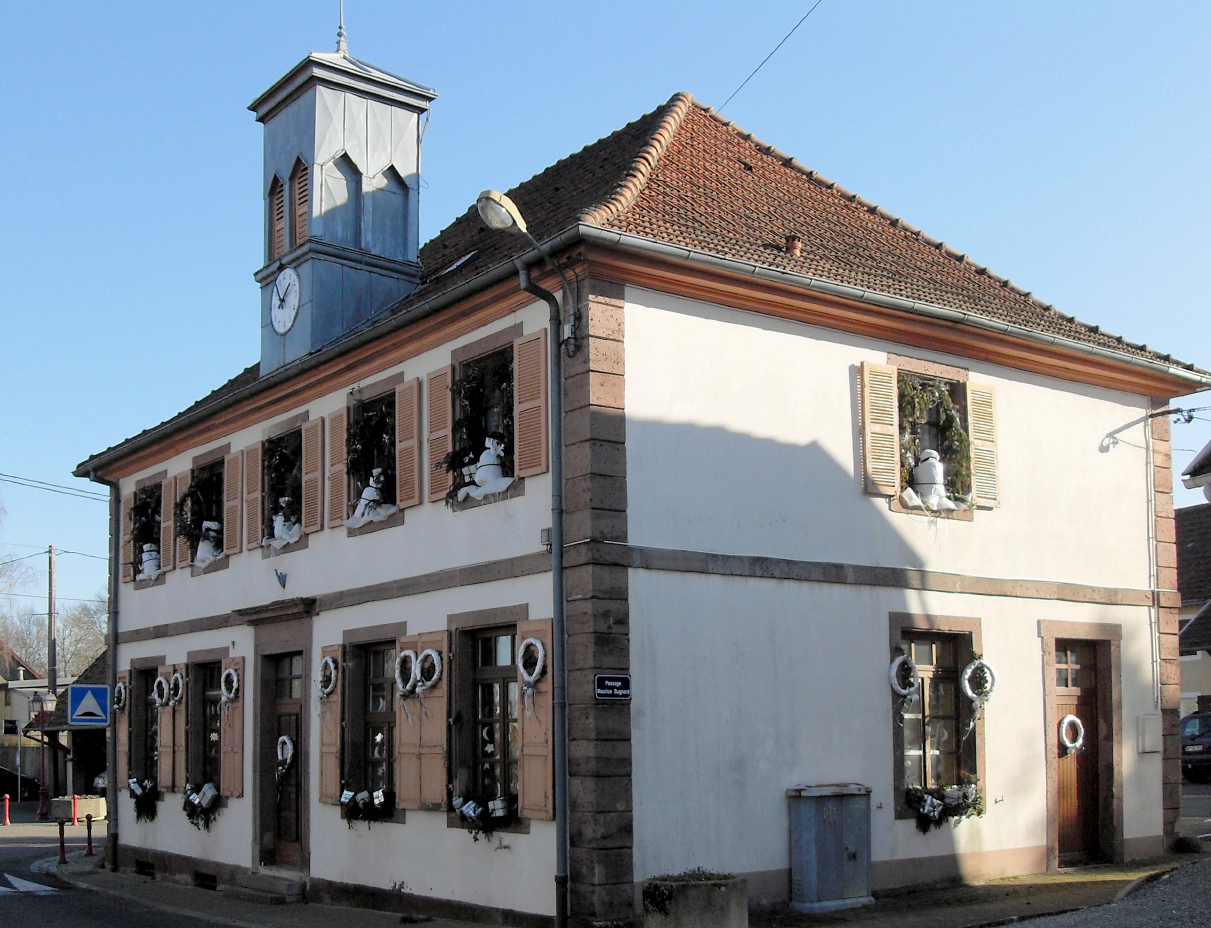 La mairie de Denney, côté nord-ouest